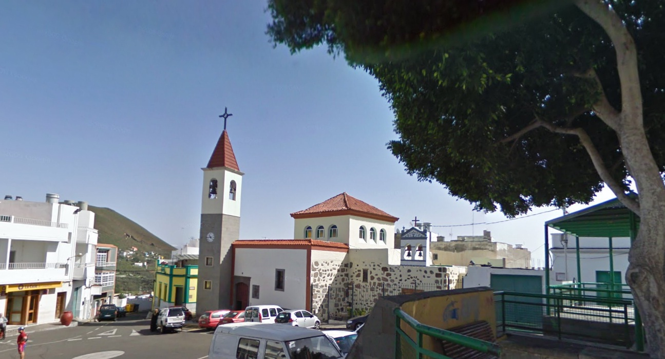 Iglesia del pueblo lomomagullero en la actualidad